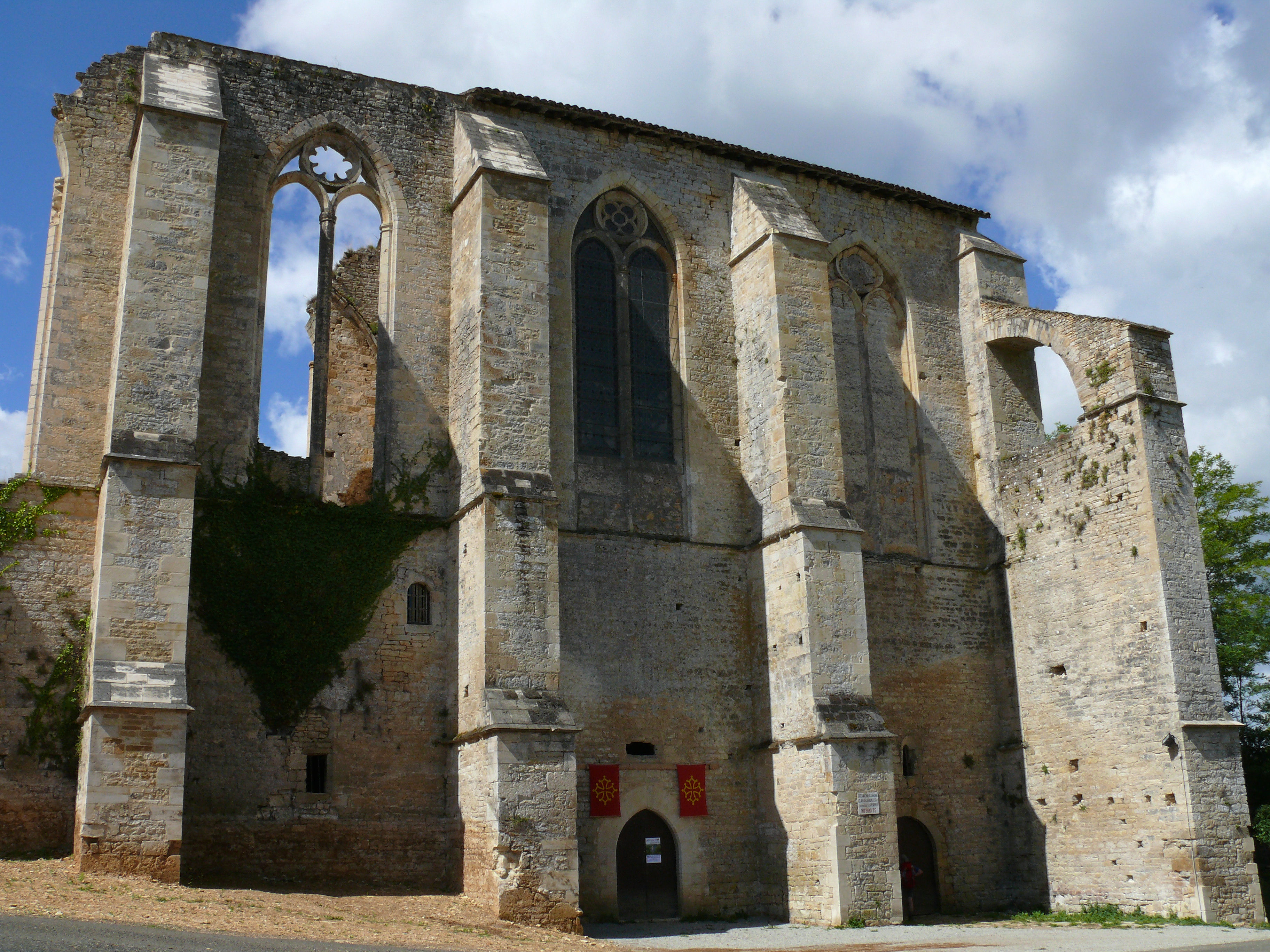 Léobard - L'Abbaye Nouvelle - Eglise